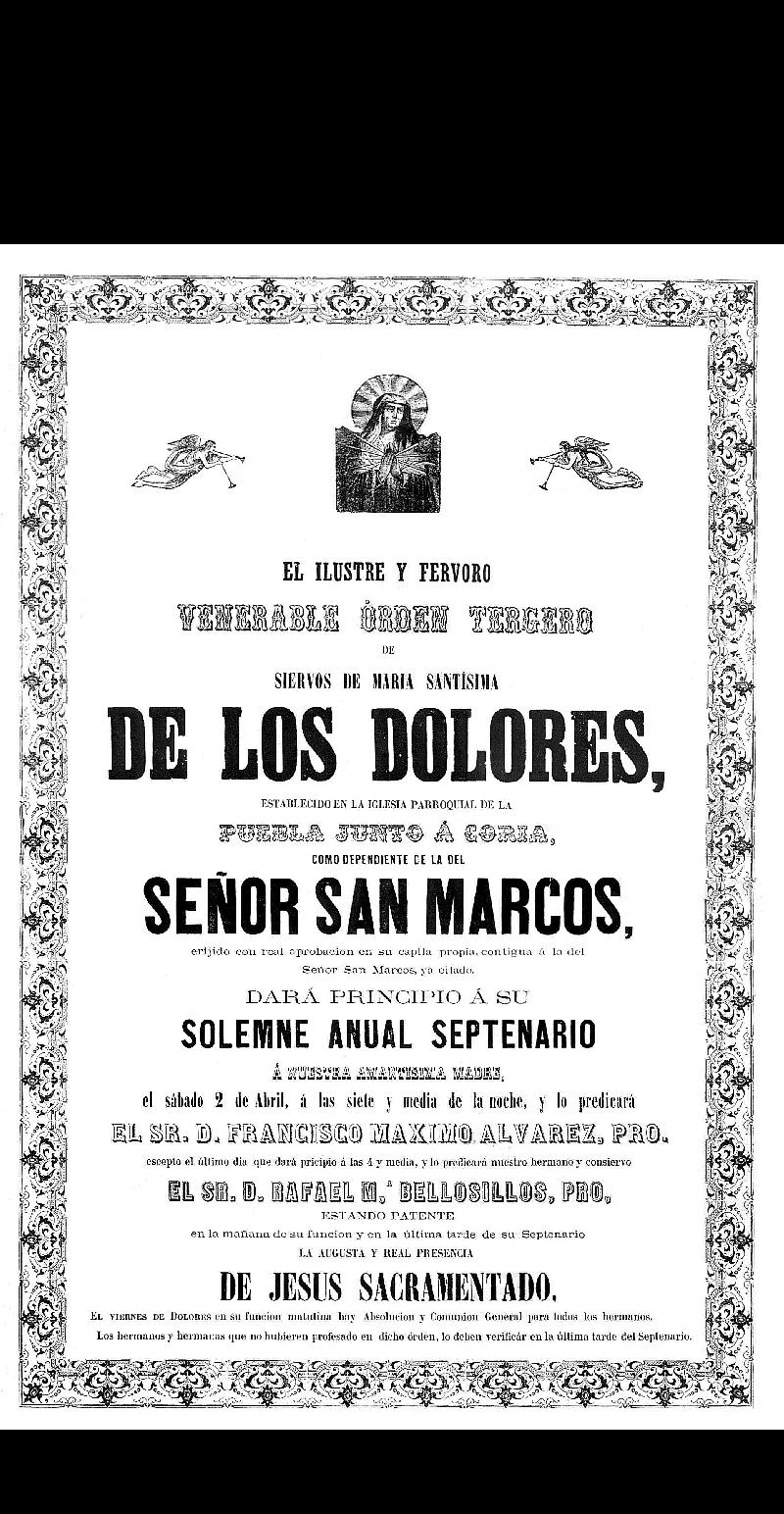 Cartel de cultos de la Hermandad de los Dolores de La Puebla del Río (Sevilla). Año 1870.